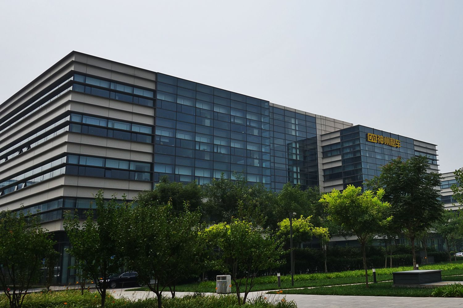 天津自贸区机场片区神州租车总部大楼